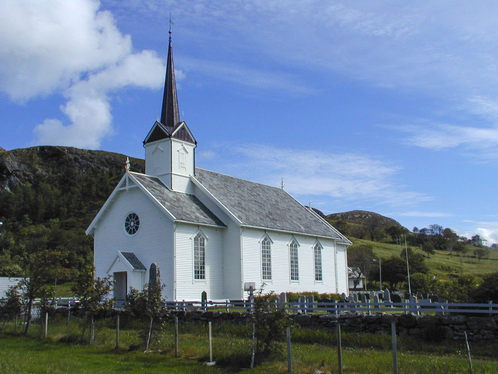 Sande kirke i Møre og Romsdal. Foto: Max Ingar Mørk. Fra Riksantikvarens Kulturminnesøk.